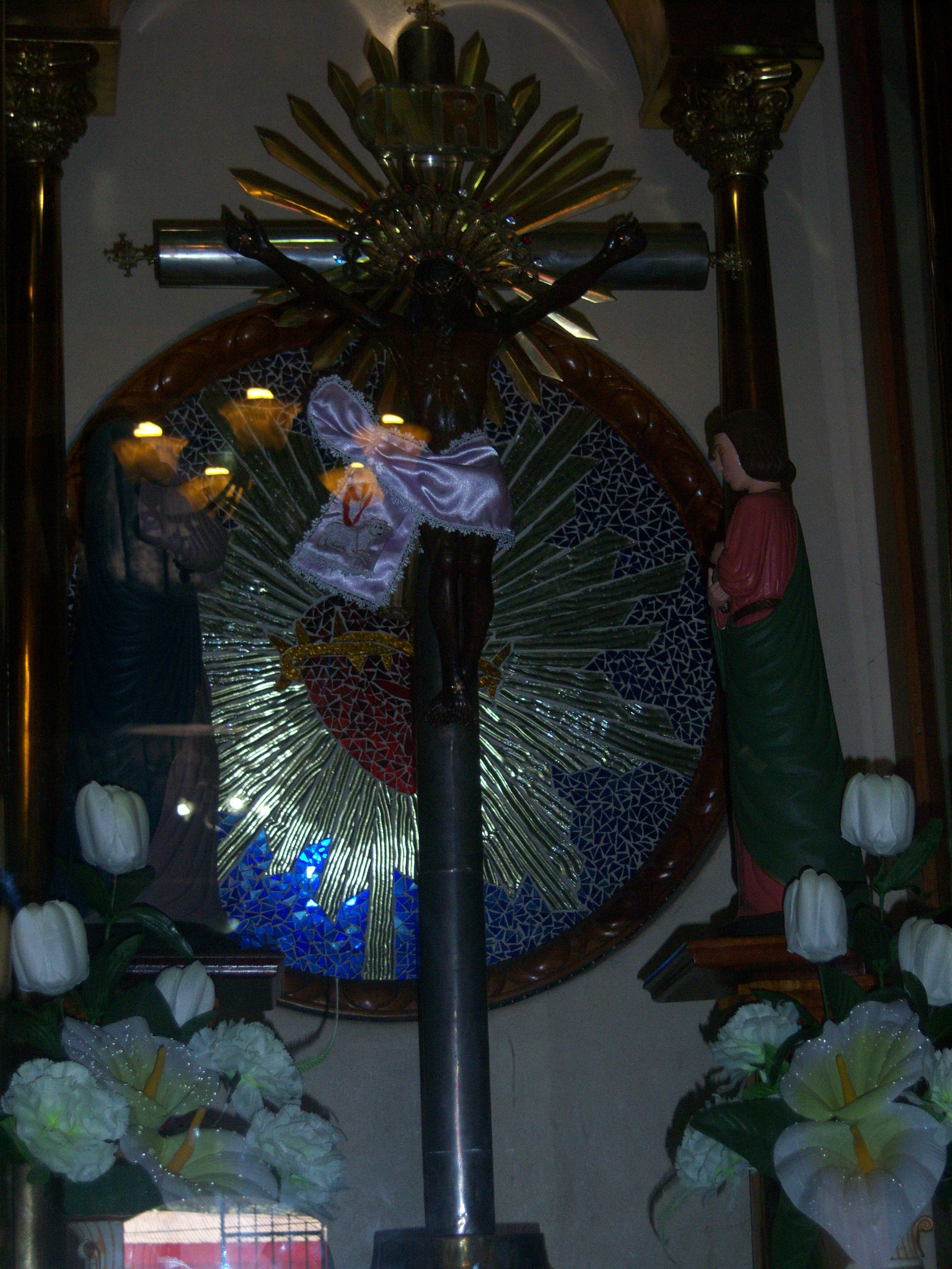 Talla del Señor de los Milagros de El Sauce. Leòn, Nicaragua